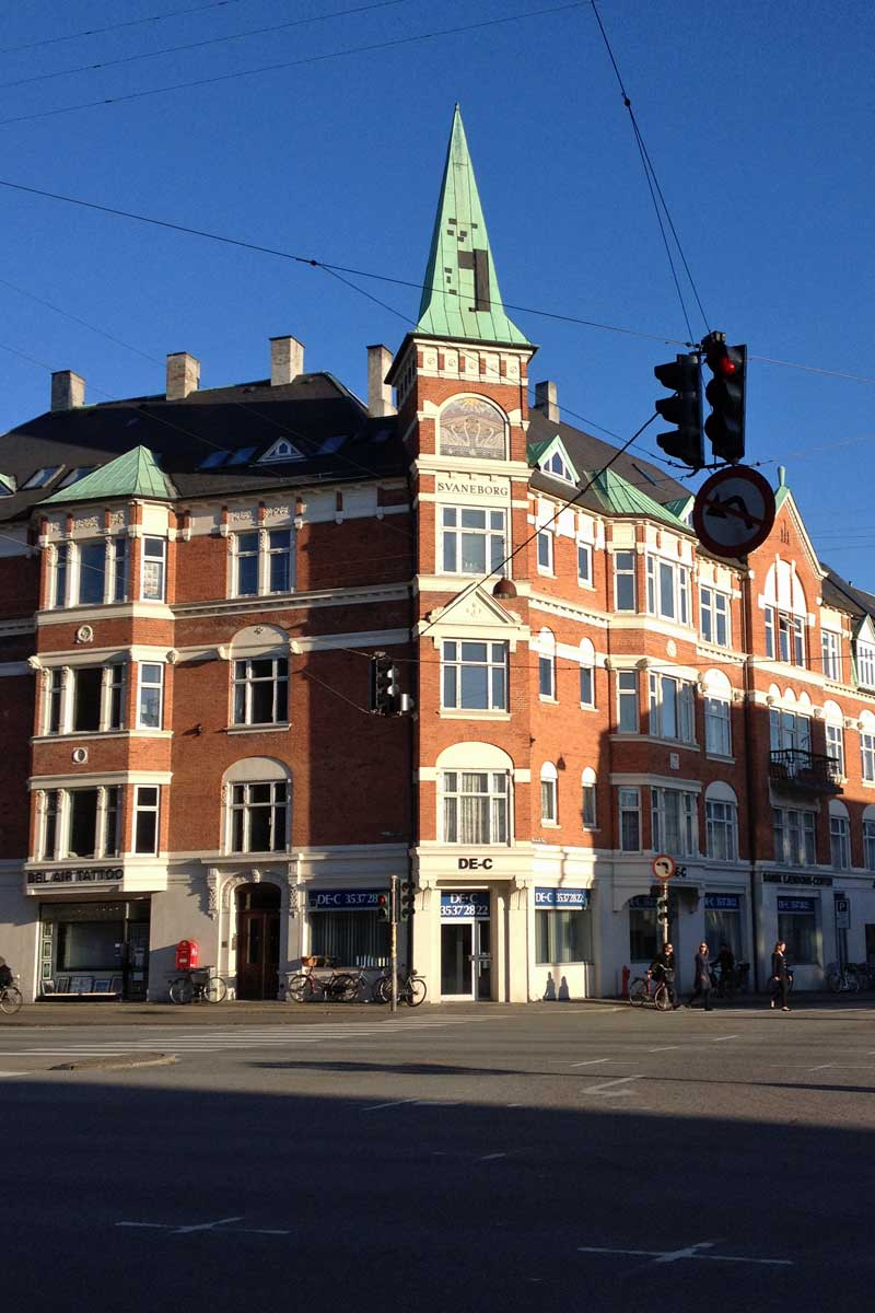 Åboulevard 31 (Svaneborg) in Copenhagen, Denmark